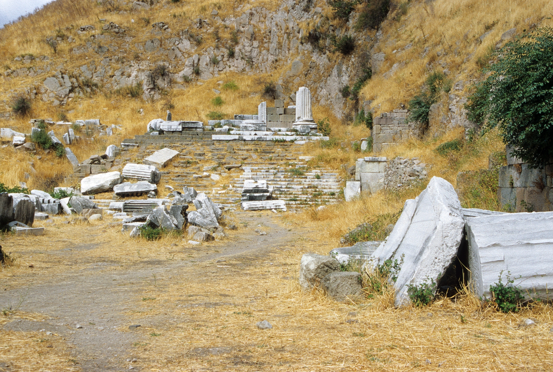 Pergamon, Westtürkei, Dionysostempel am Nordende der Theaterterrasse